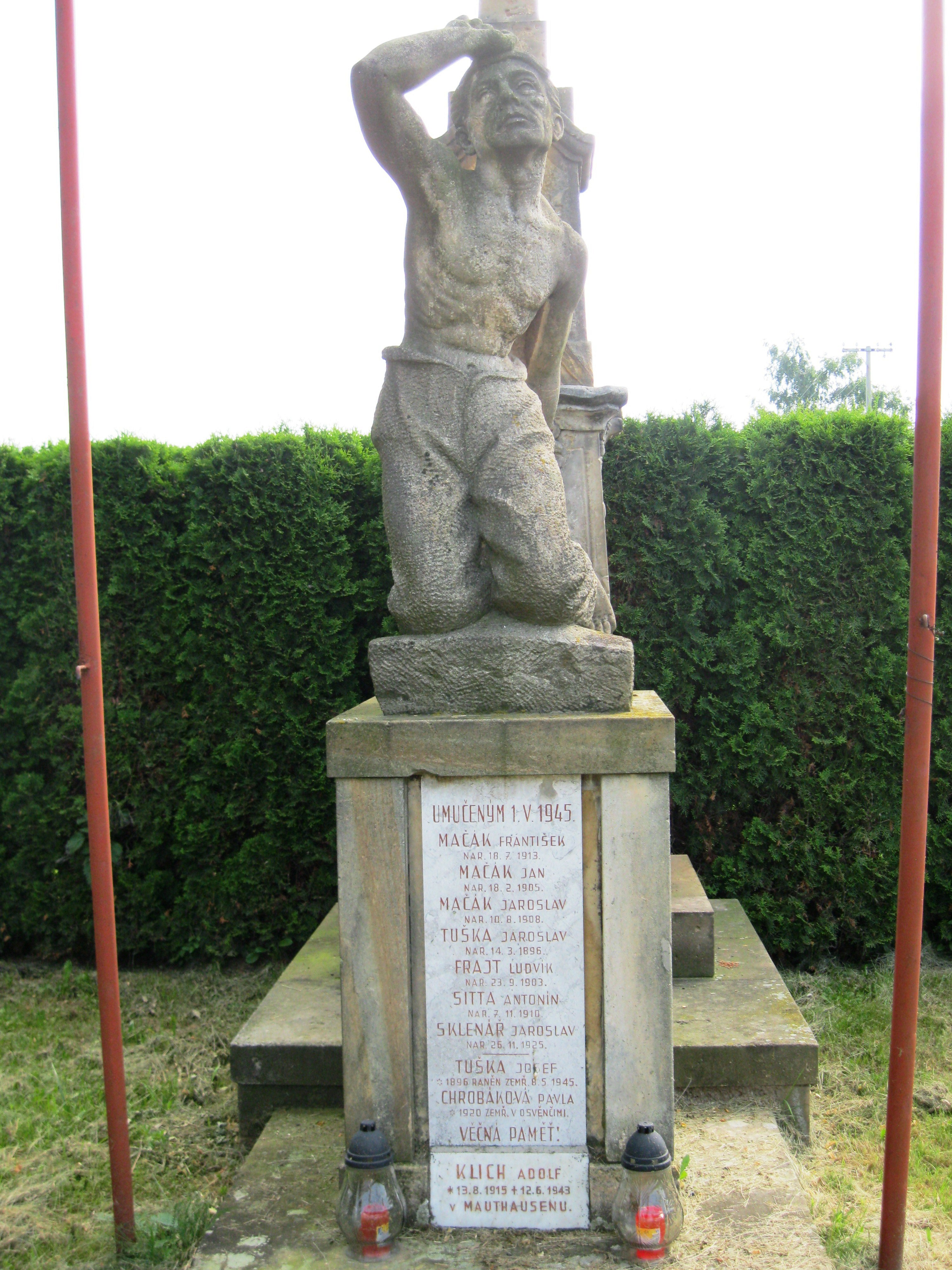 Pomník umučeným r. 1945 (Přestavlky), proti čp. 38, Přestavlky